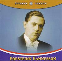 Geisladiskurinn Útvarpsperlur sem kom út árið 2005.